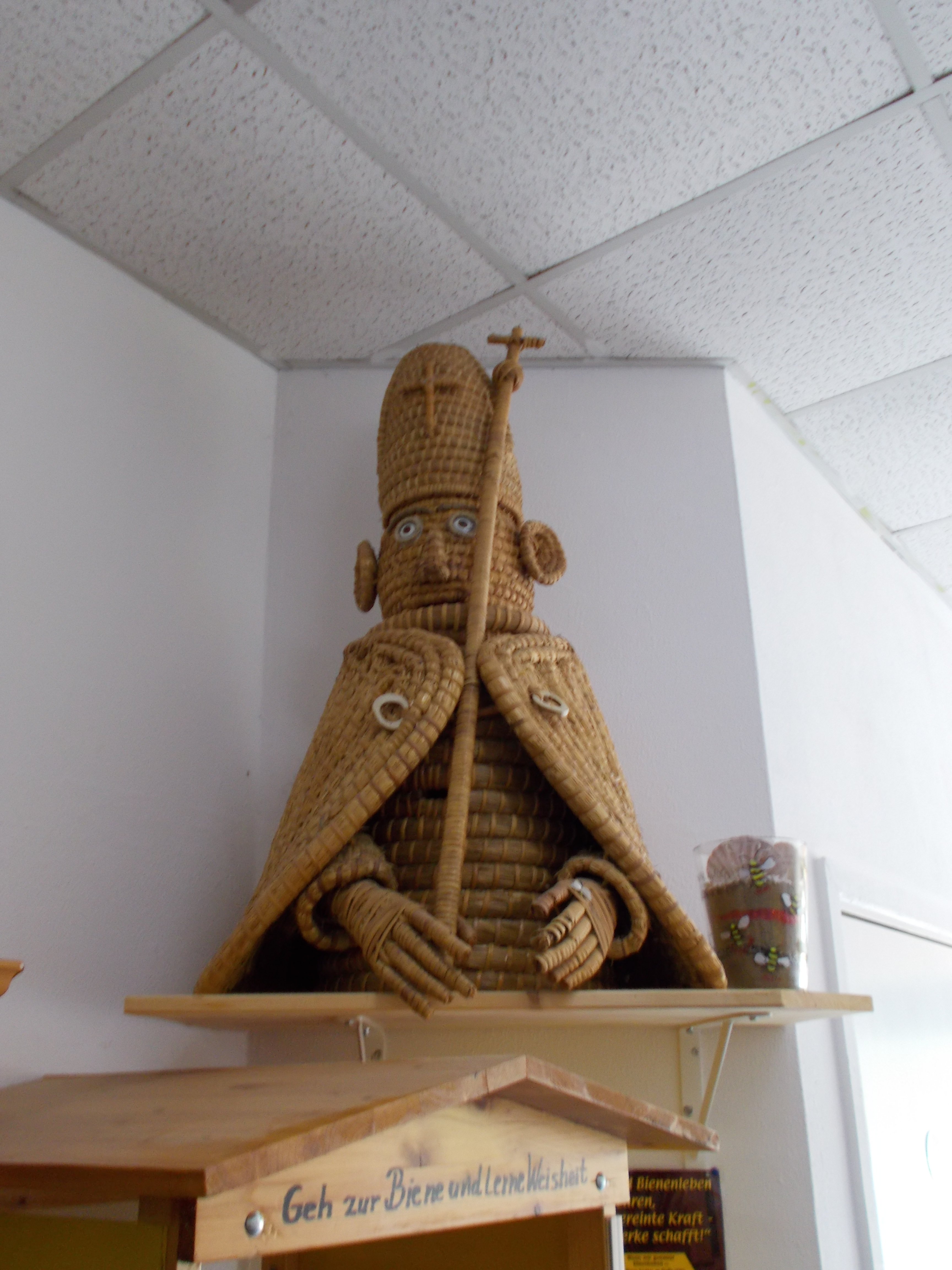 Das Bienenmuseum in Duisburg Rummeln-Kaldenhausen ist ein kleines Imkereimuseum des Kreisimkerverband Duisburg e. V. - Bienenkorb in der Form des Heiligen Ambrosius, dem Schutzpatron der Imker.